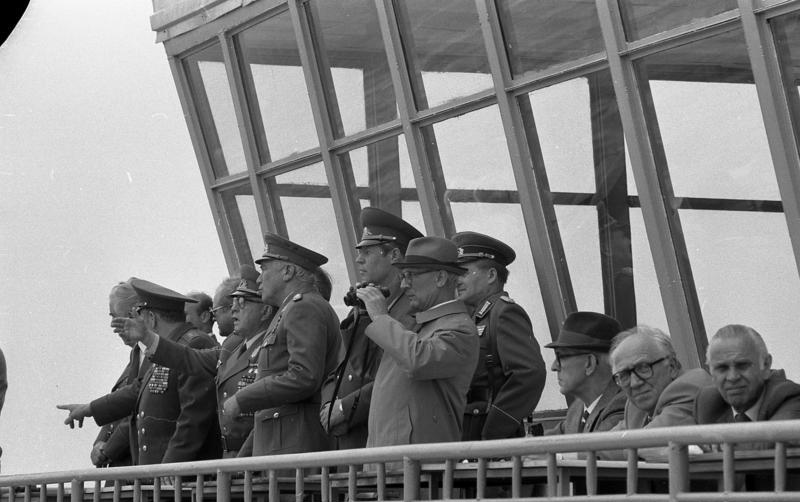 Magdeburg, Erich Honecker besucht die Truppe ADN-ZB/Reiche 19.5.83 Magdeburg: Truppenbesuch Erich Honeckers bei der GSSD Während ihres Besuchs konnten die Mitglieder der Partei- und Staatsführung die Handlungen eines Gardeschützenregiments bei einer taktischen Übung mit Gefeschtsschießen verfolgen; von rechts: Erich Honecker, Generalsekretär des ZK der SED und Vorsitzender des Staatsrates der DDR, Michail Saizew, Oberkommandierender der GSSD, Armeegeneral Heinz Hoffmann, Minister für Nationale Verteidigung, und Armeegeneral Erich Mielke, Minister für Staatssicherheit der DDR. Abgebildete Personen: Mielke, Erich: Minister für Staatssicherheit, Armeegeneral, Politbüro des Zentralkomitees (ZK) der SED, DDR (GND 118977490) Honecker, Erich: Staatsratsvorsitzender, Generalsekretär des ZK der SED, DDR (GND 118553399) Saizew, Michael: General, Oberkommandierender der Gruppe der sowjetischen Streitkräfte in Deutschland (GSSD), Sowjetunion Hoffmann, Heinz: Minister für Nationale Verteidigung, Mitglied des ZK der SED, DDR